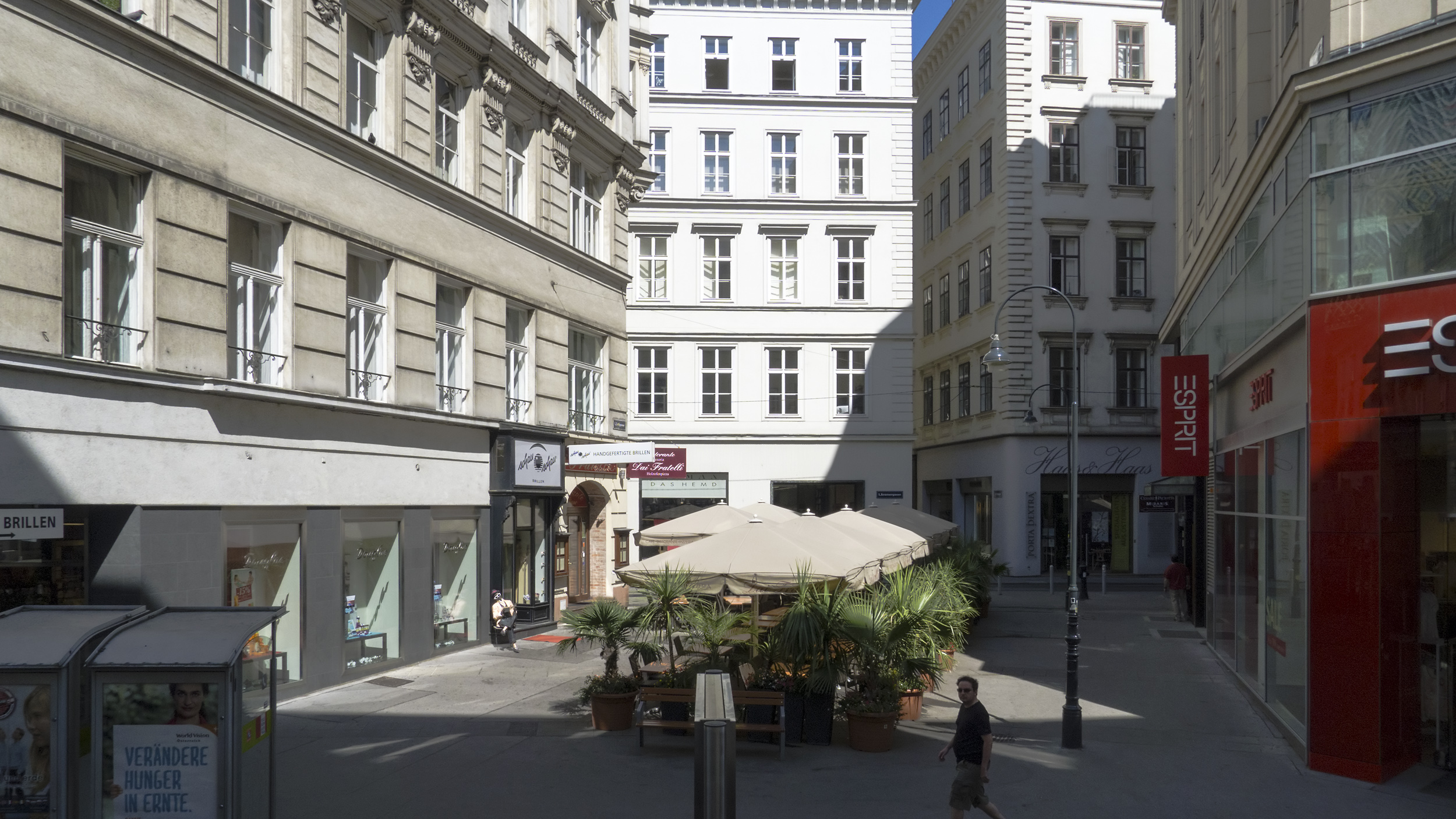 Ertlgasse in Wien 1 bei der Rotenturmstraße Richtung Norden